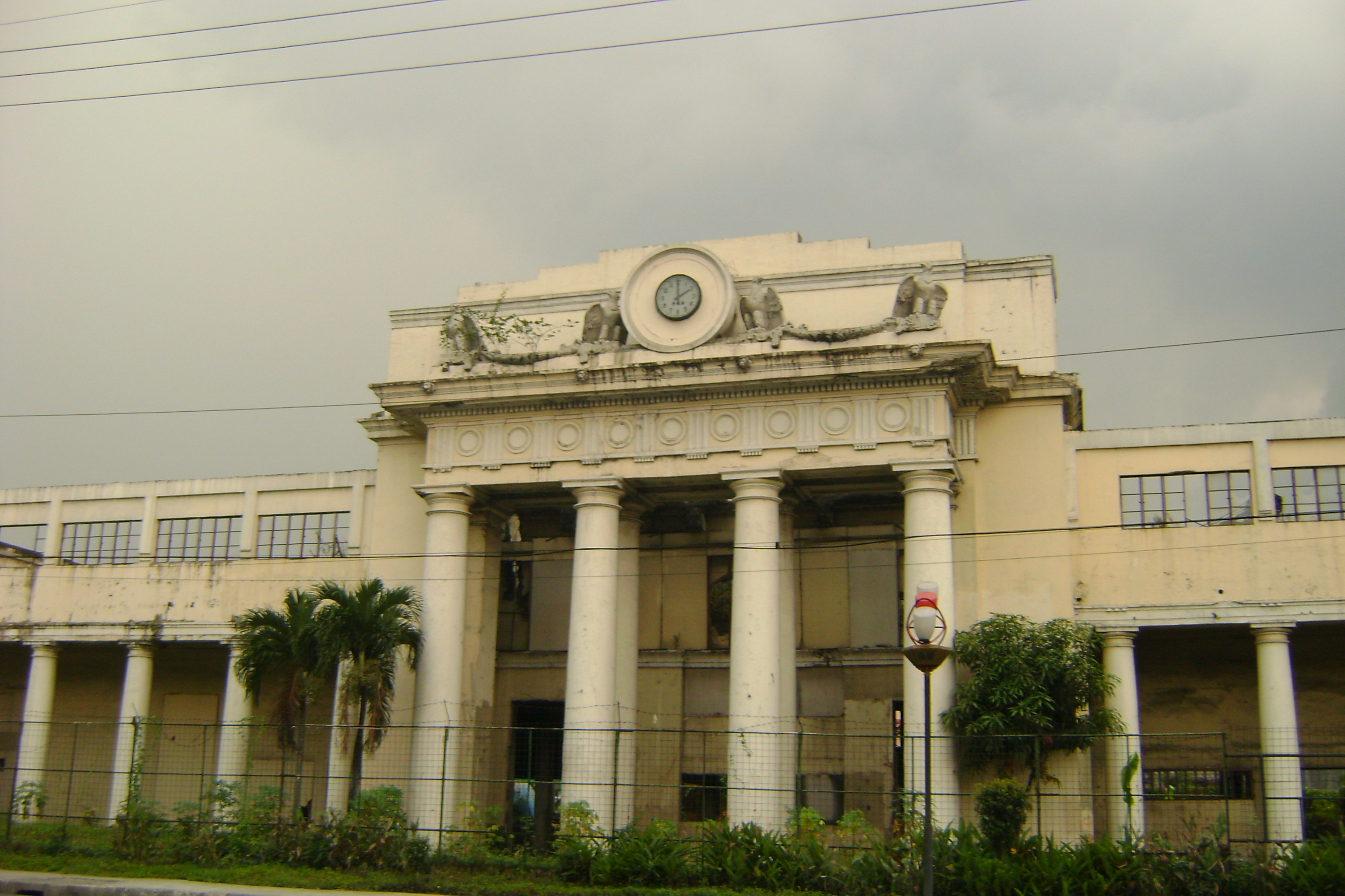 Old Paco railway station in Manila, Philippines